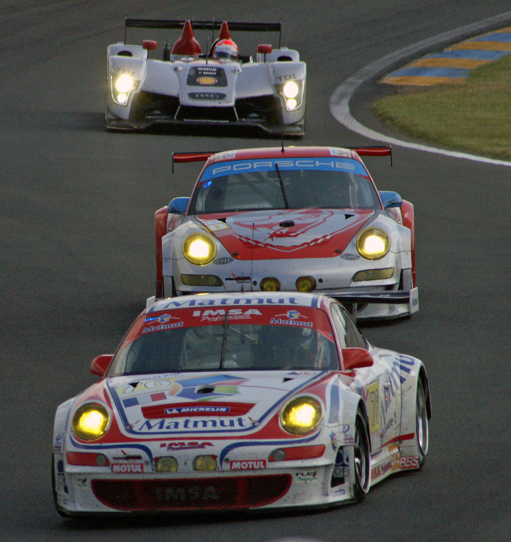 IMSA Performance au Mans 2009